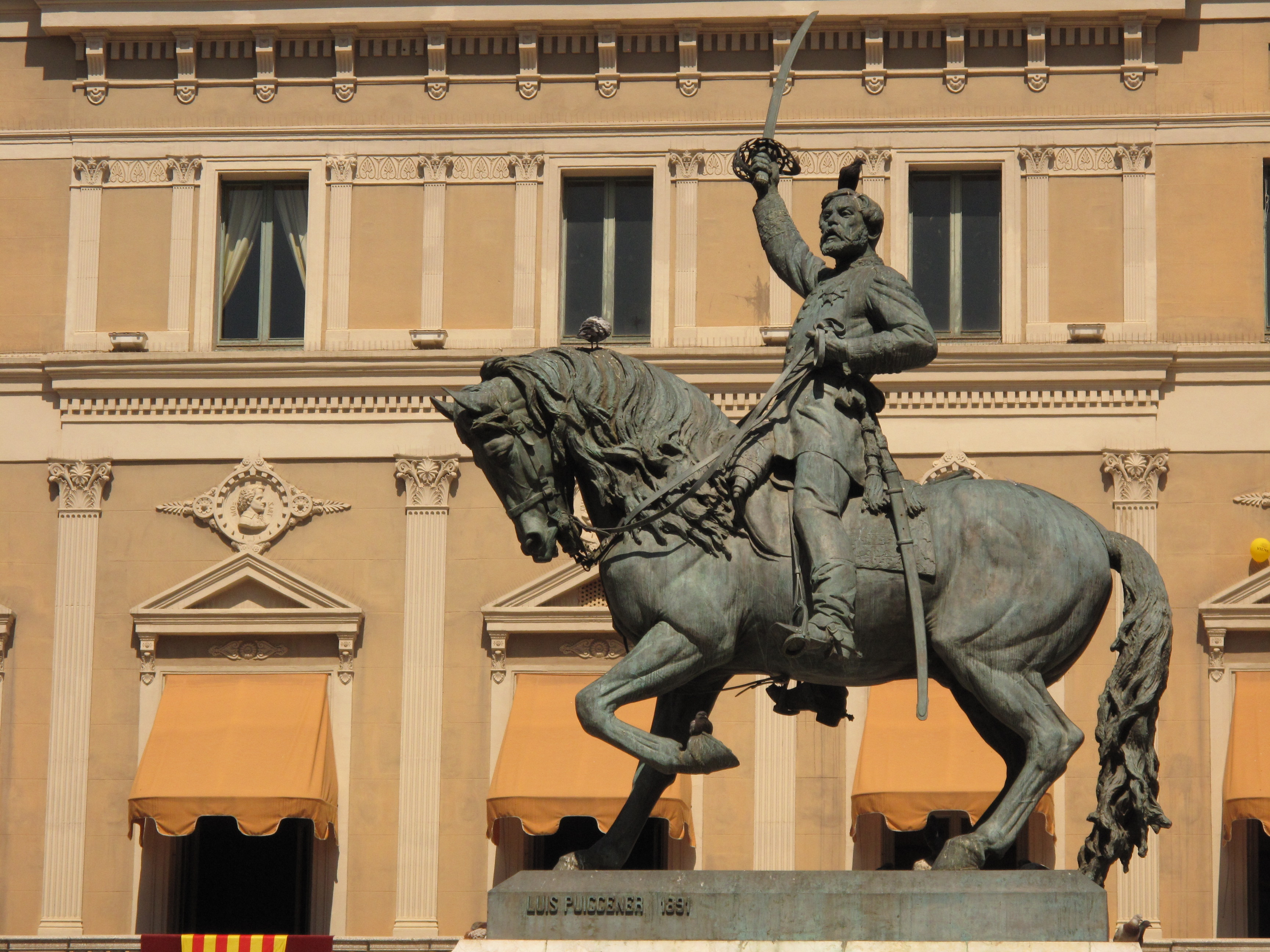 Edifici El Círcol, Teatre Fortuny i porxos de la plaça Prim (Reus)